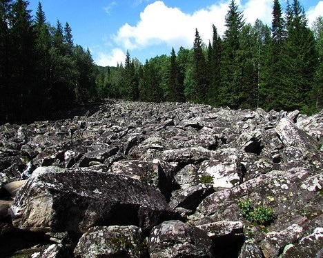 Каменная река (курум). Белорецкий район. Башкортостан